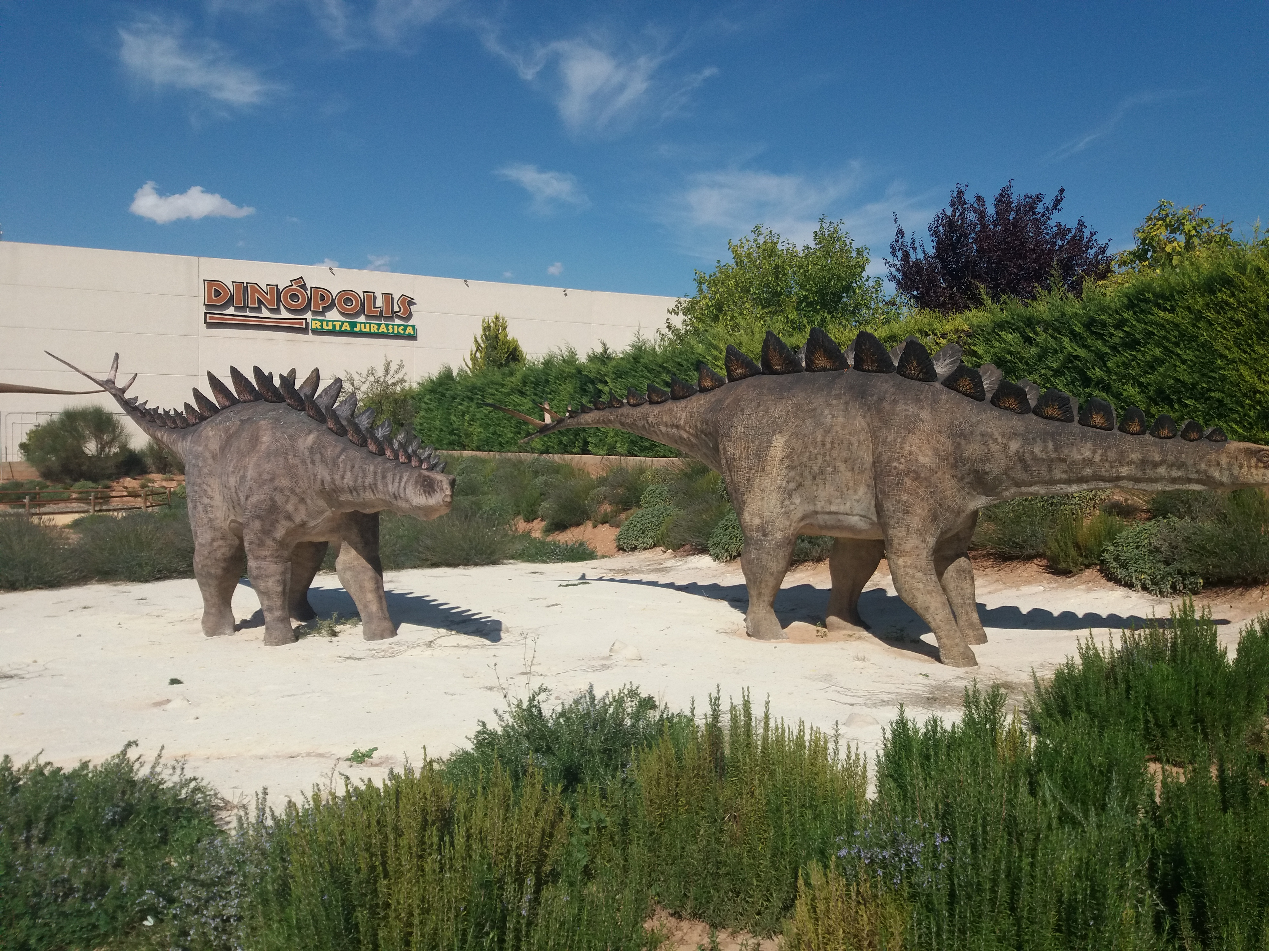 Réplicas de dinosaurios en Dinópolis (Teruel - España).